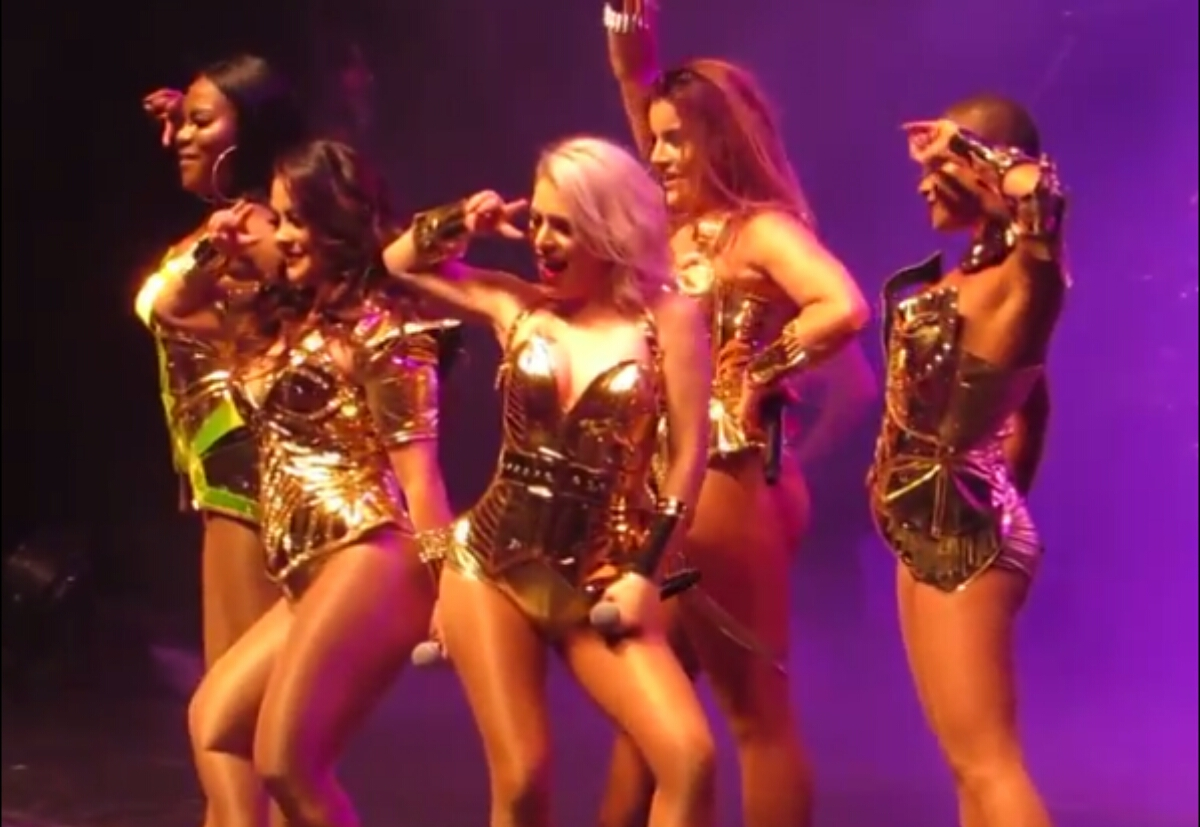 Rouge cantando Não da pra Resistir, na turnê Rouge 15 Anos.